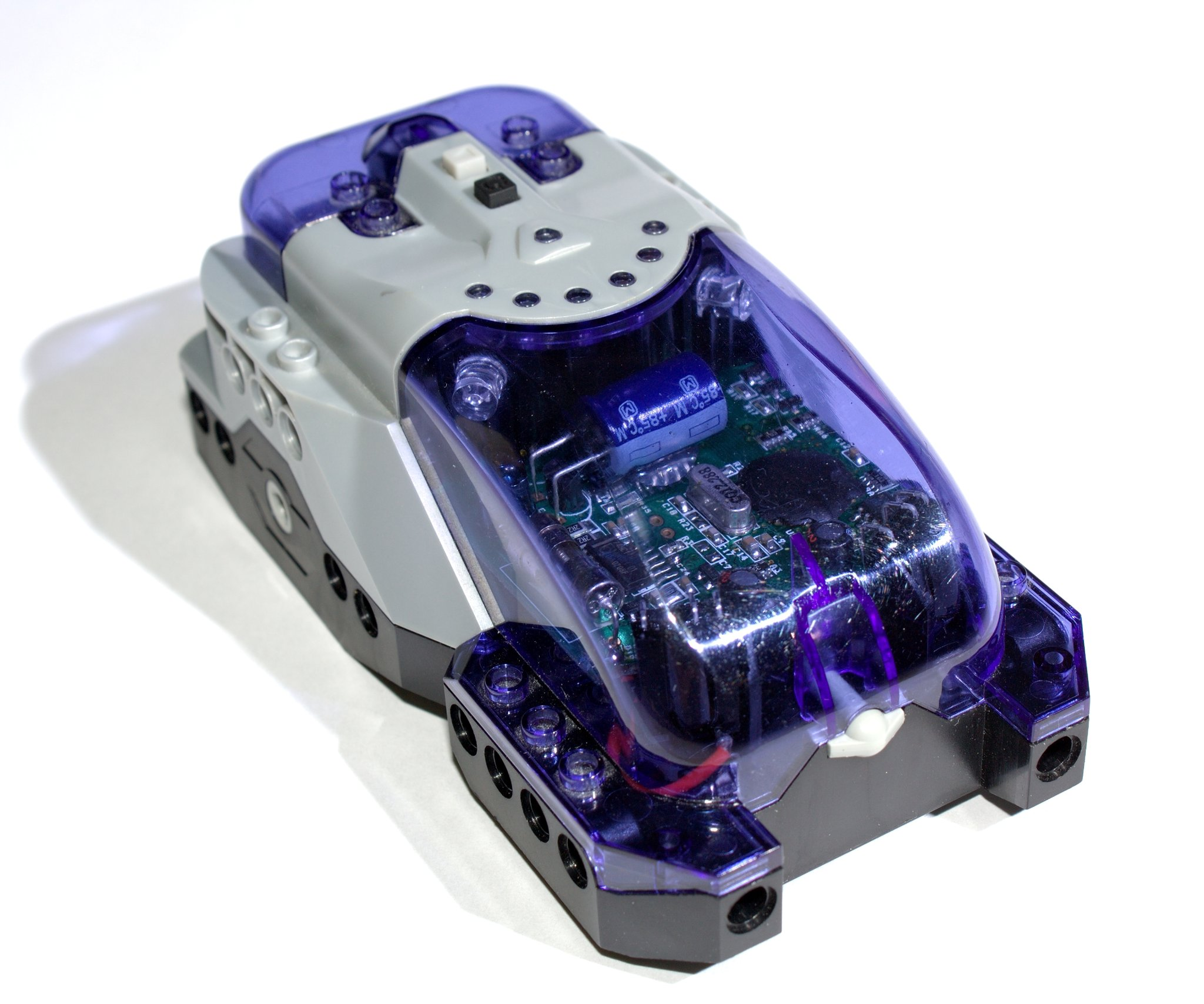 Lego Spybot Hauptbaustein